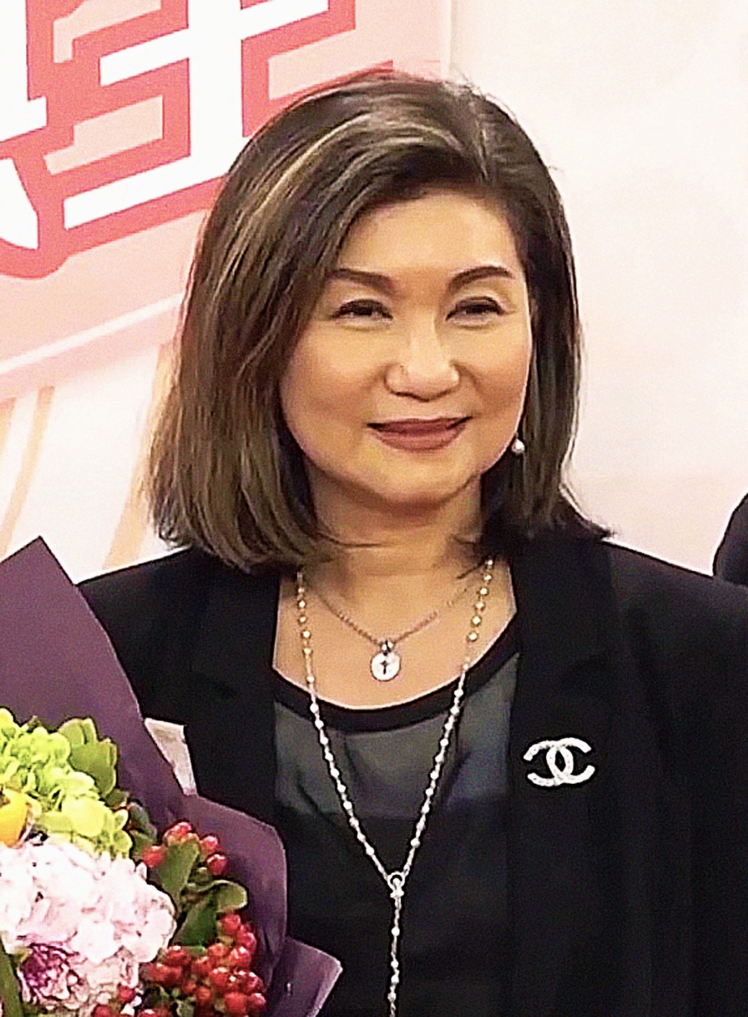 中文（香港）: myTV SUPER《Gi味俱全》記者會